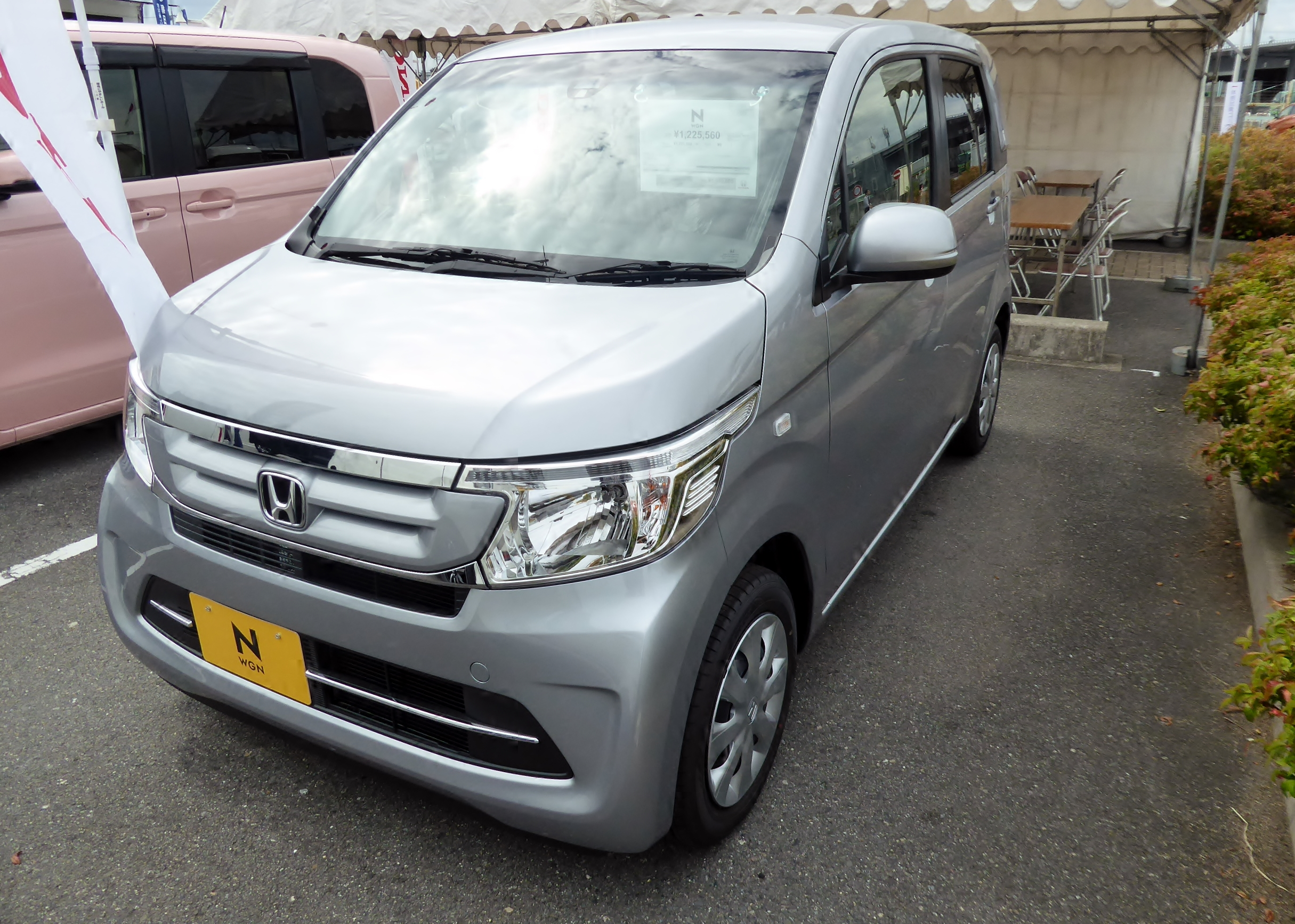 DBA-JH1型ホンダ・N-WGN Gをフロントから撮影。